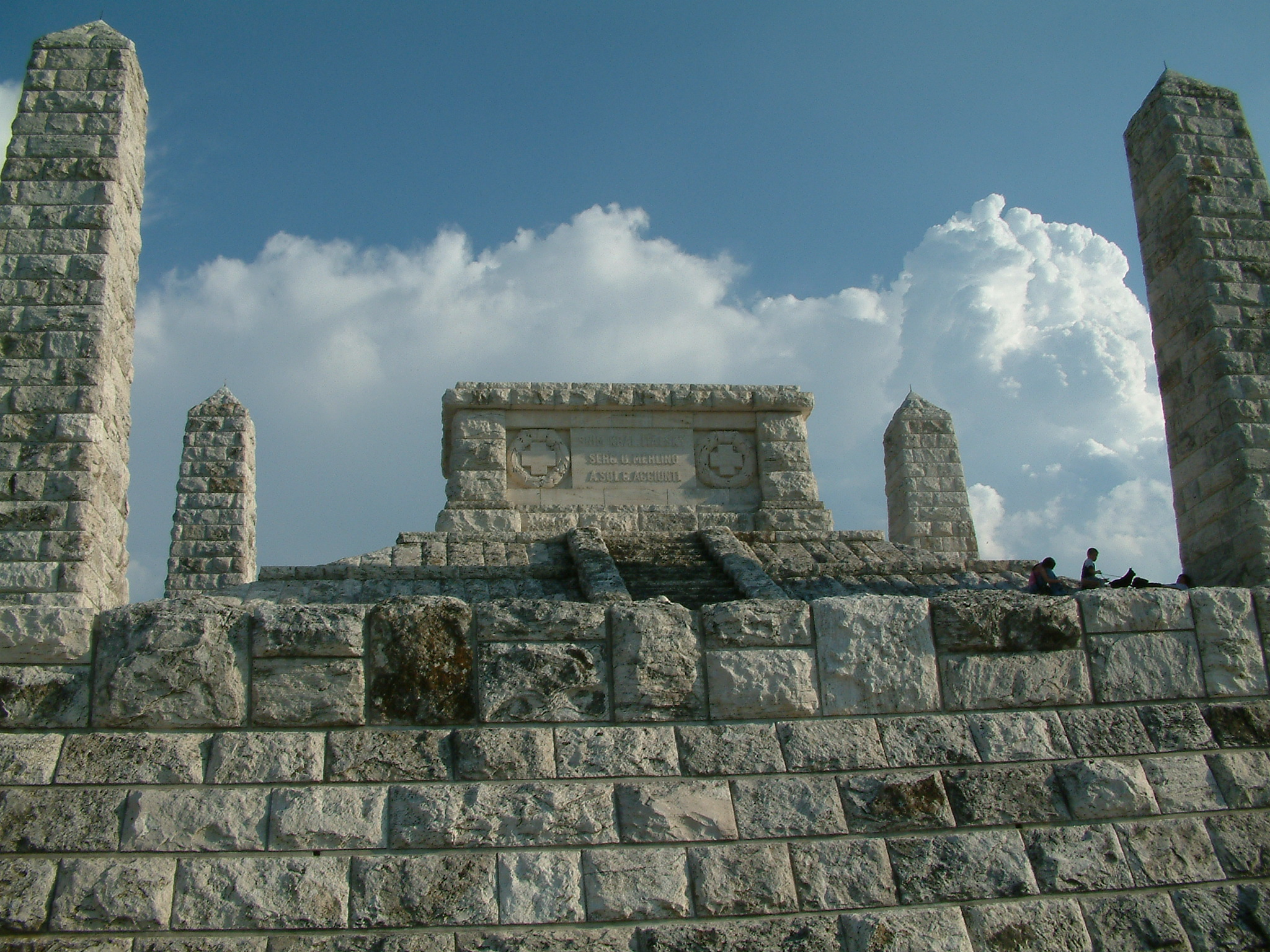 Bradlo